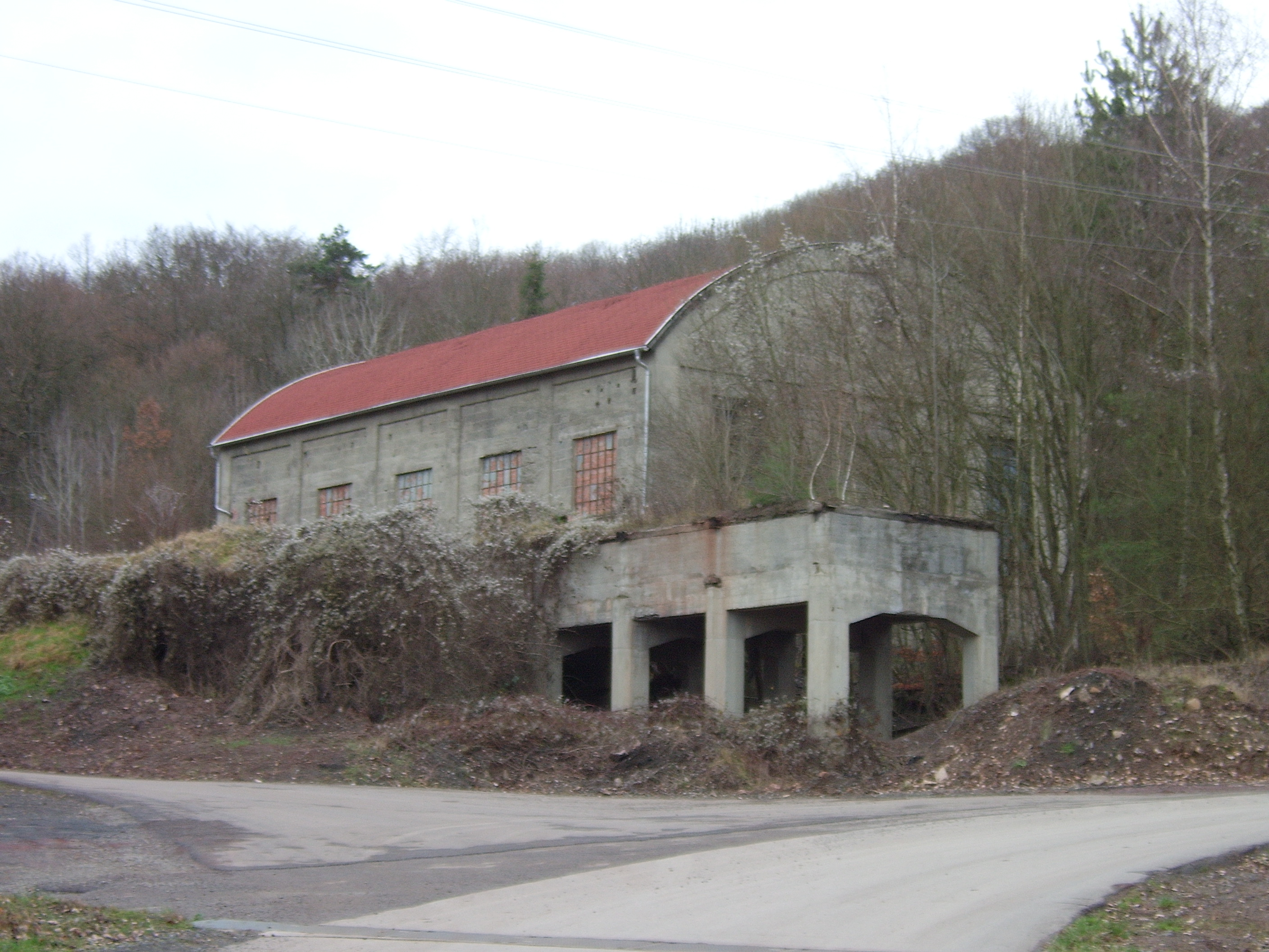 Überreste des Brecherhauses wo 5 Basaltbrecher den vom großen Gleichberg kommenden Basalt zerkleinerten. In den 1990er Jahren wurde das Haus, bis auf das Erdgeschoß und die im Vordergrund sichtbare Verladerampe, abgetragen.